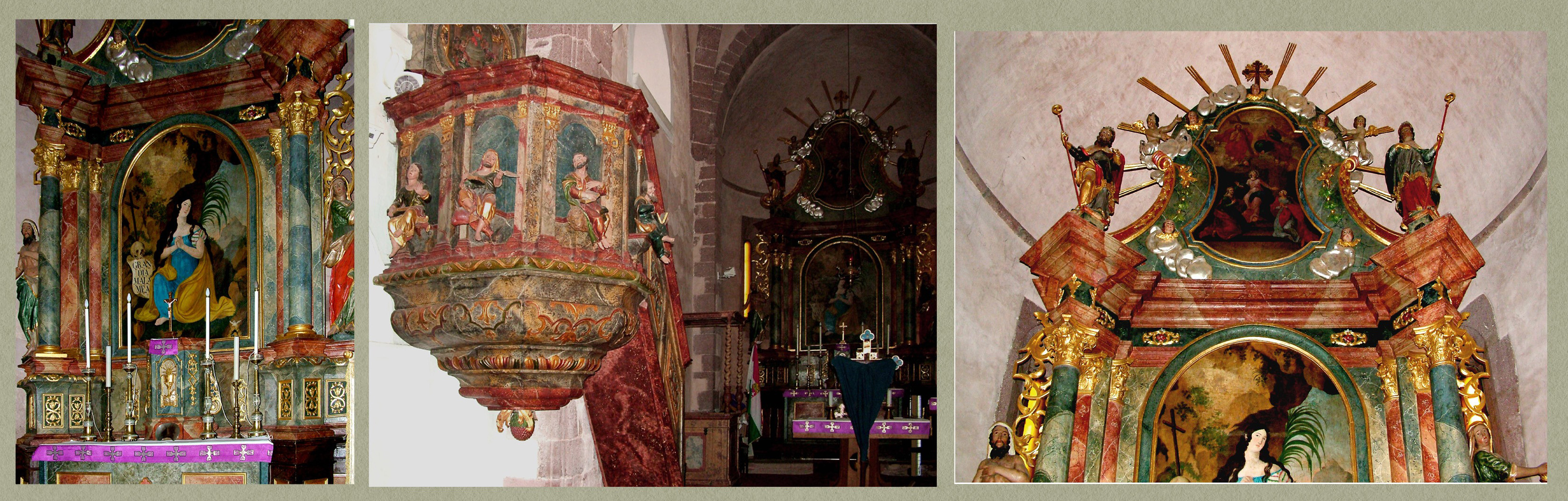 A felsőörsi Mária Magdolna-templom főoltára